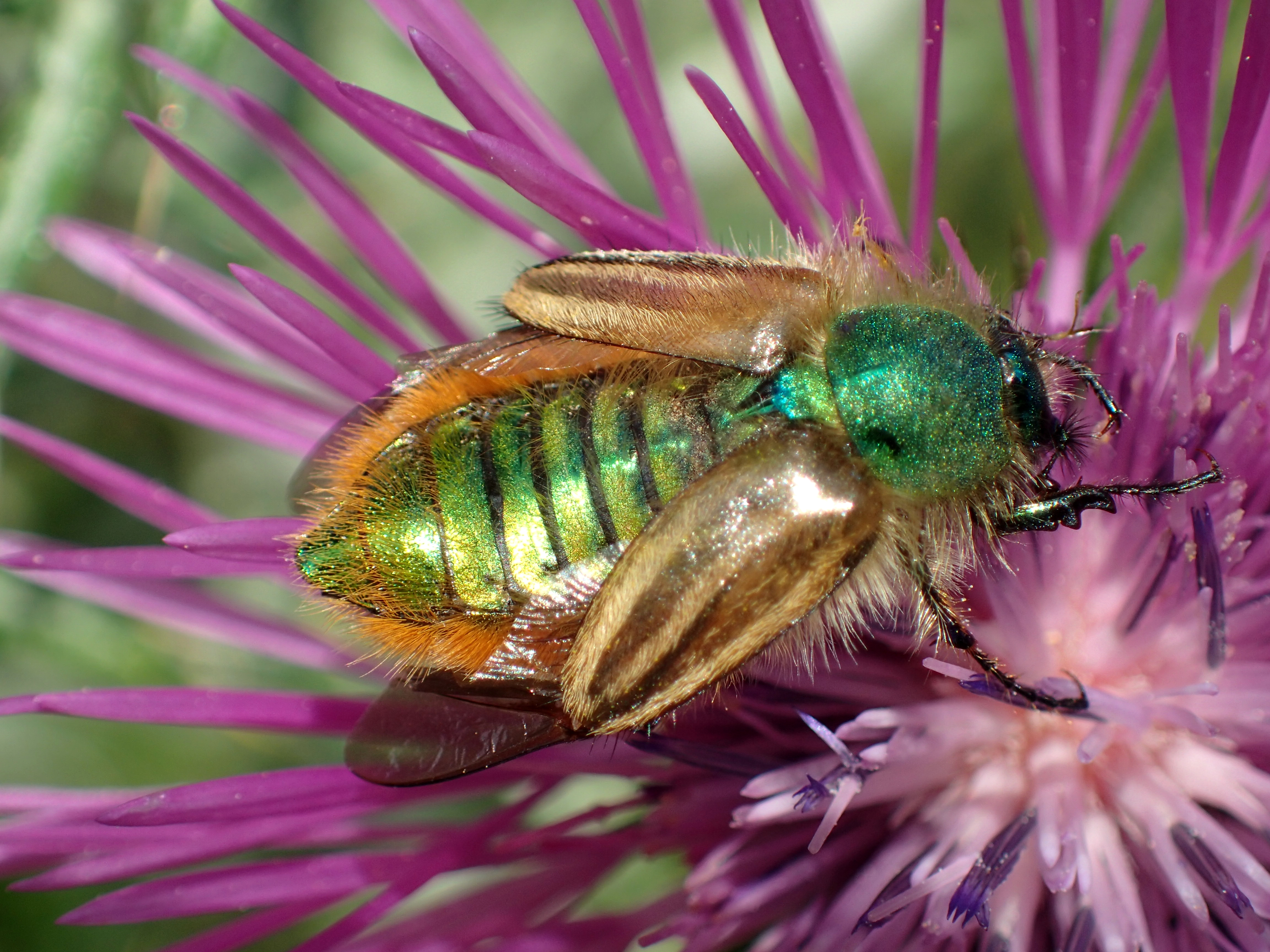 Eulasia pareyssei aus Griechenland